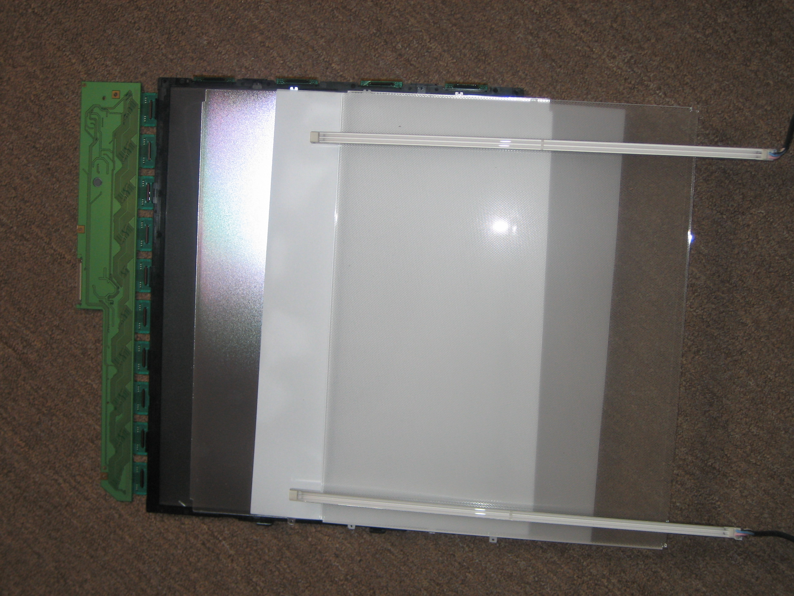 Inhalt eines Flüssigkristallbildschirmes: Bildschirmfolie mit Ansteuerplatine, Lampen und Diffusorelemente (Plastikglasplatte und Folien) zur Hintergundbeleuchtung